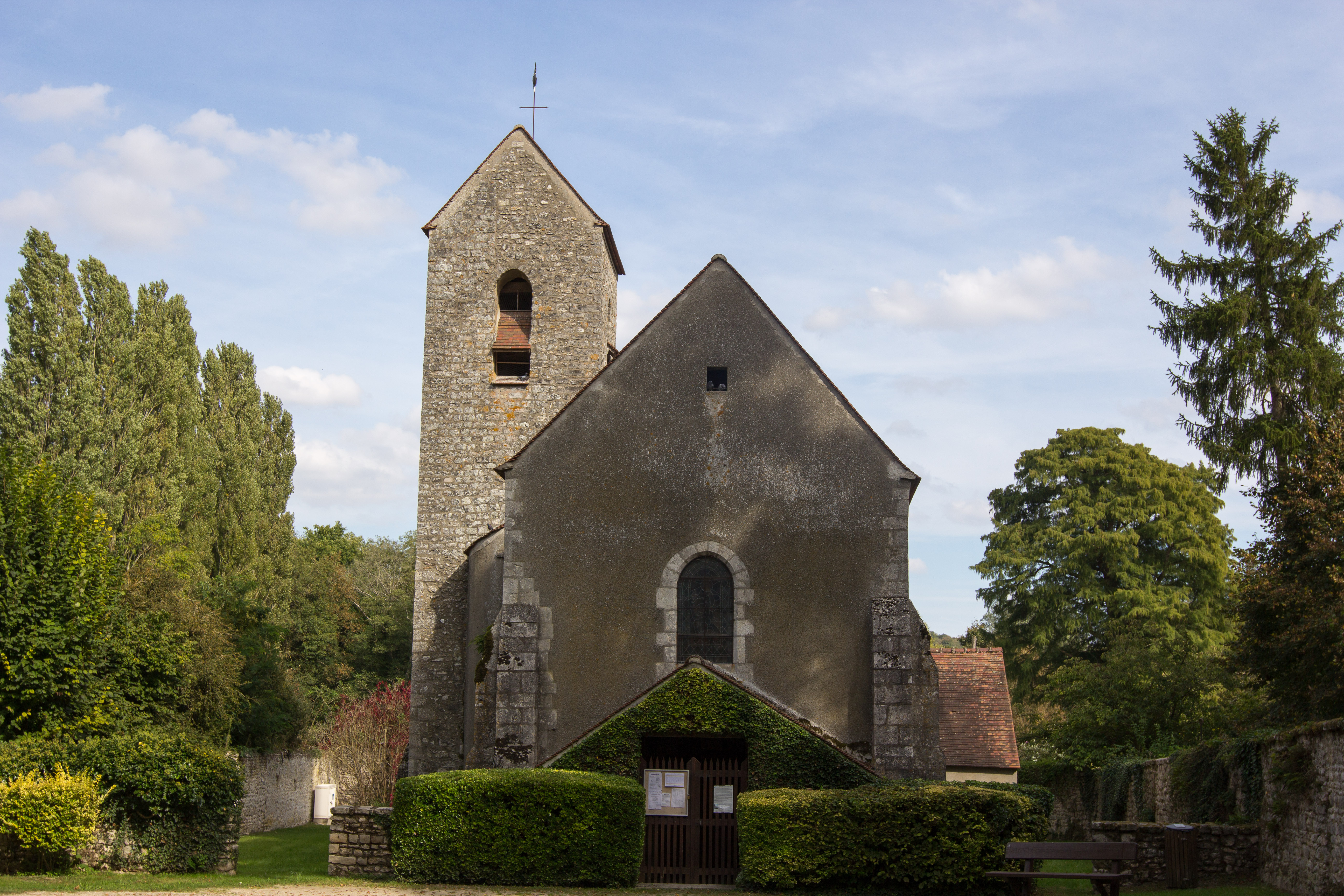 Église de Vayres-sur-Essonne / Vayres-sur-Essonne / Essonne / France